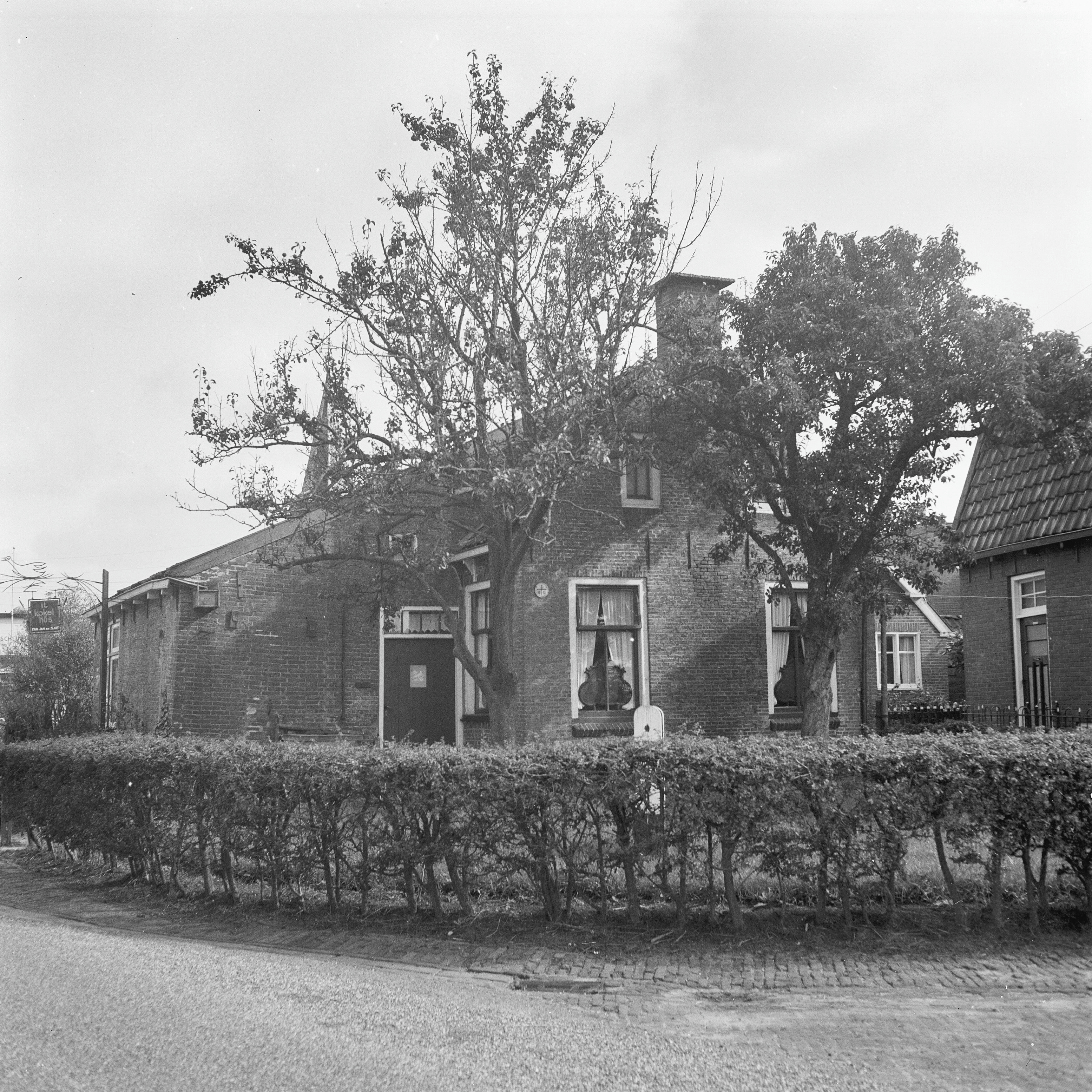 Diversen: Museum, "Kokelhûs", overzicht